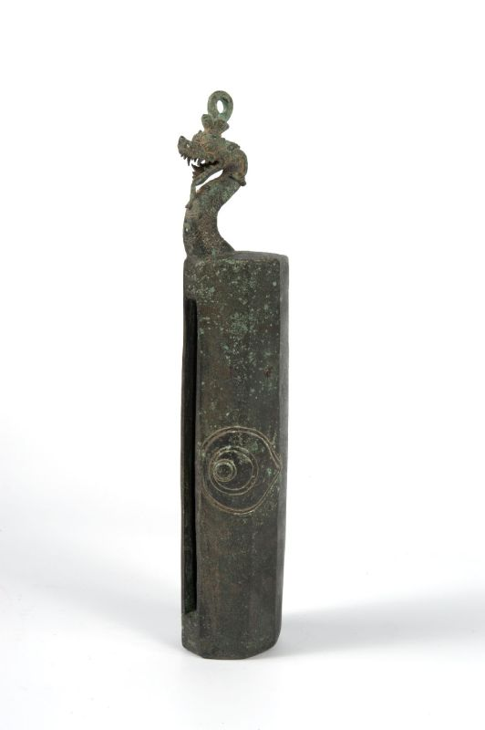 Slaginstrument. Deze kentongan is een replica van de grote houten spleettrommen (tong-tong), die oorspronkelijk een signaalfunctie hadden in een dorp of werden gebruikt bij aanvang van een ceremonie. Hij werd door meerdere personen bespeeld, waarbij elke speler een ander ritme aanhoudt (Miller and Williams, 2000:646). De houten trom werd aan de bomen gehangen en dan geslagen. De naam kentongan betekent letterlijk 'dingen die het geluid als van een tong-tong maken'. Deze kentongan had waarschijnlijk een ceremoniële functie. De slangachtige figuur die aan een van de korte zijden oprijst is een naga, een zeer bekend draak- of slangenmotief uit de Indonesische bovennatuurlijke wereld. De vorm van de drakenkop verwijst naar de Majapahit periode. (Fontijn: Het goddelijk gezicht van Indonesië, 1990) In het midden van het instrument staat echter het jaartal 1081, wat identiek is aan 1159 AD en de kentongan plaatst in de Kadirische periode van de Oud-Javaanse geschiedenis onder de regering van Koning Sarweswara of zijn directe voorganger. De slangenfiguur spreekt dit dus echter tegen. Aan de andere kant staat een oog afgebeeld, dat waakzaamheid symboliseert. De klank die het instrument voortbrengt is de g. . Spleettrom van geelkoper Unknown language: Kentongan kenthongan